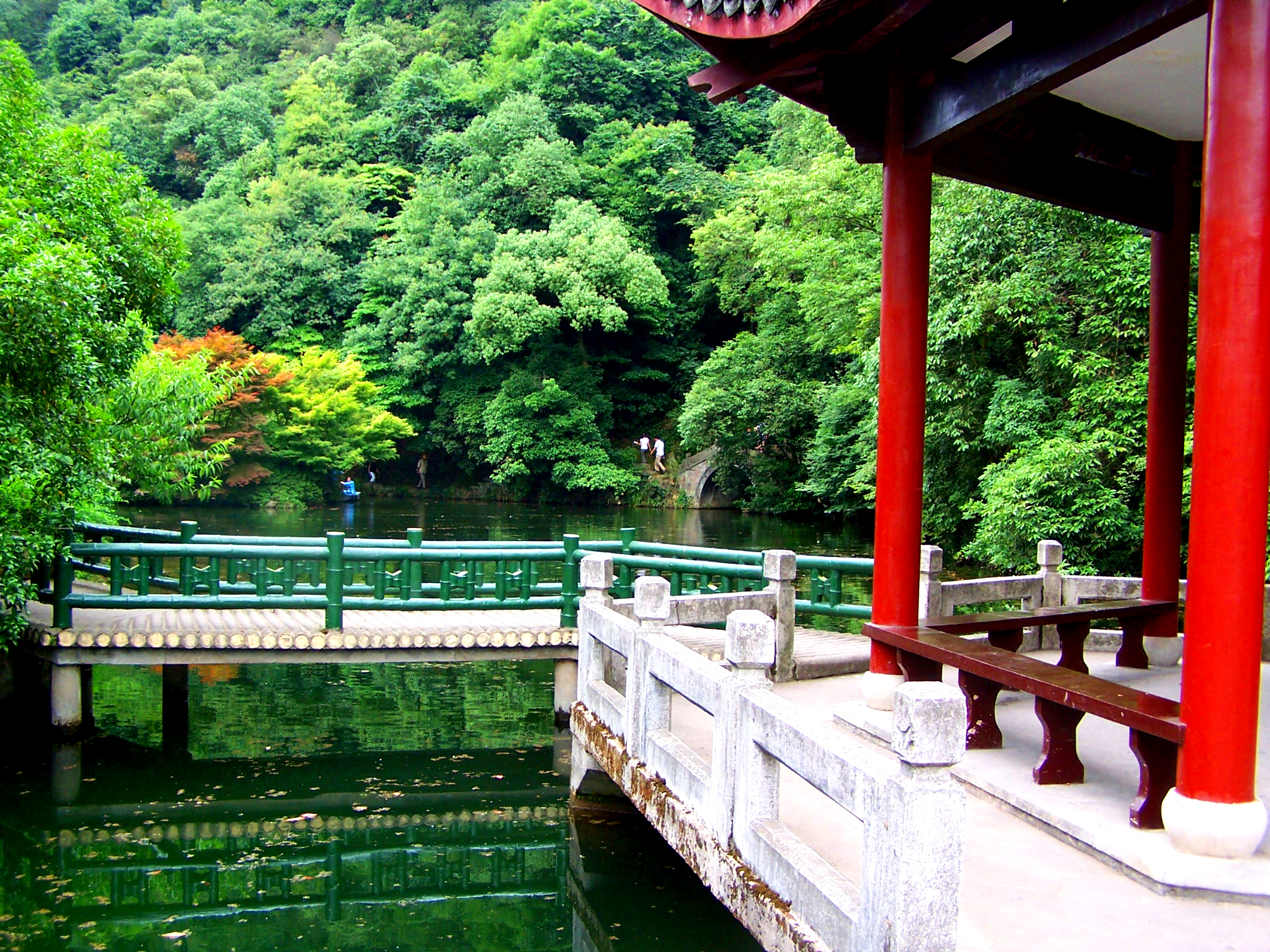 西湖十景之一九溪烟树